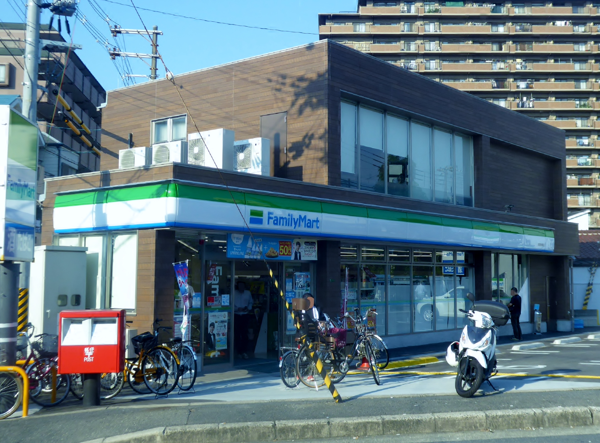 ファミリーマート新喜多東店を撮影。